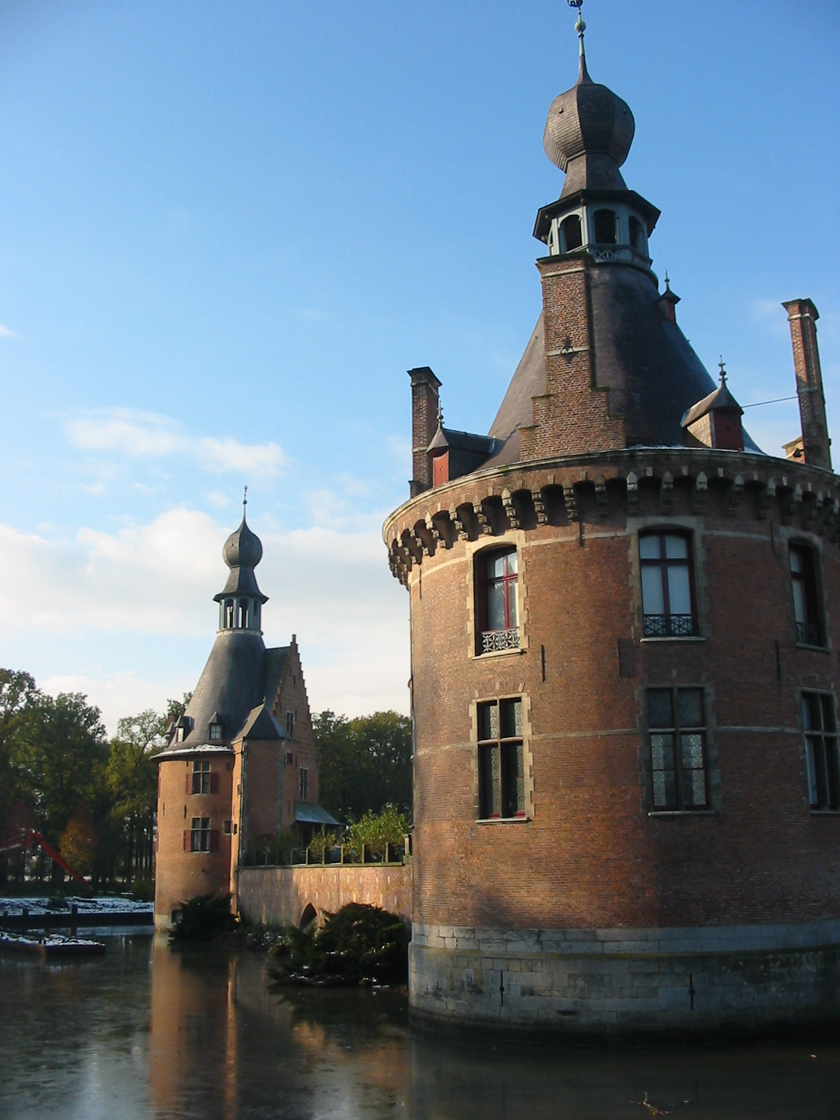 Ooidonk_castle